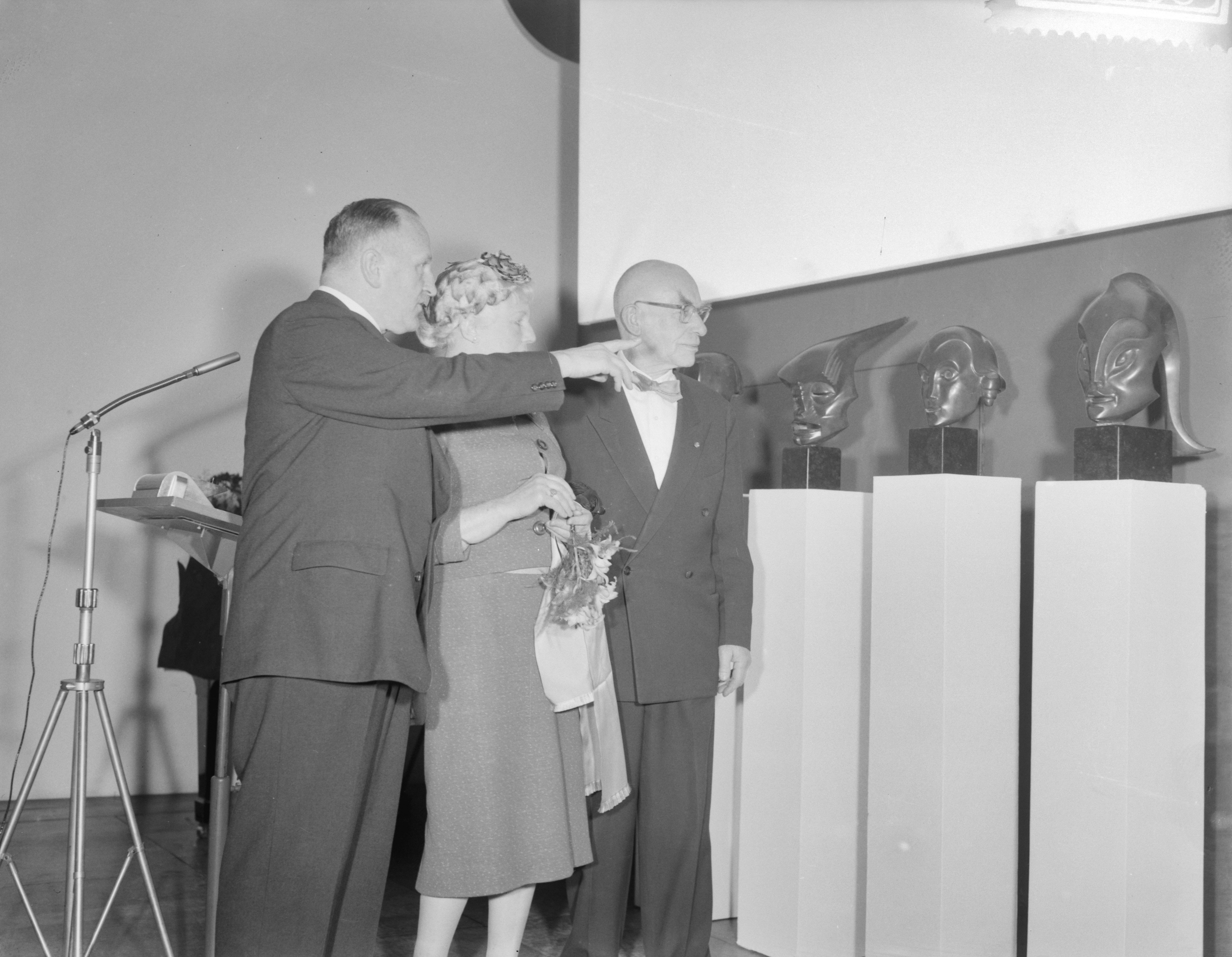 Collectie / Archief : Fotocollectie Anefo Reportage / Serie : [ onbekend ] Beschrijving : Huldiging van Hildo Krop t.g.v. zijn 75ste verjaardag Hildo Krop biedt vijf bronzen maskers aan aan de gemeente, links wethouder mr. A. de Roos Datum : 21 februari 1959 Trefwoorden : Huldigingen Persoonsnaam : Krop, Hildo Fotograaf : Pot, Harry / Anefo Auteursrechthebbende : Nationaal Archief Materiaalsoort : Negatief (zwart/wit) Nummer archiefinventaris : bekijk toegang 2.24.01.04 Bestanddeelnummer : 910-1683